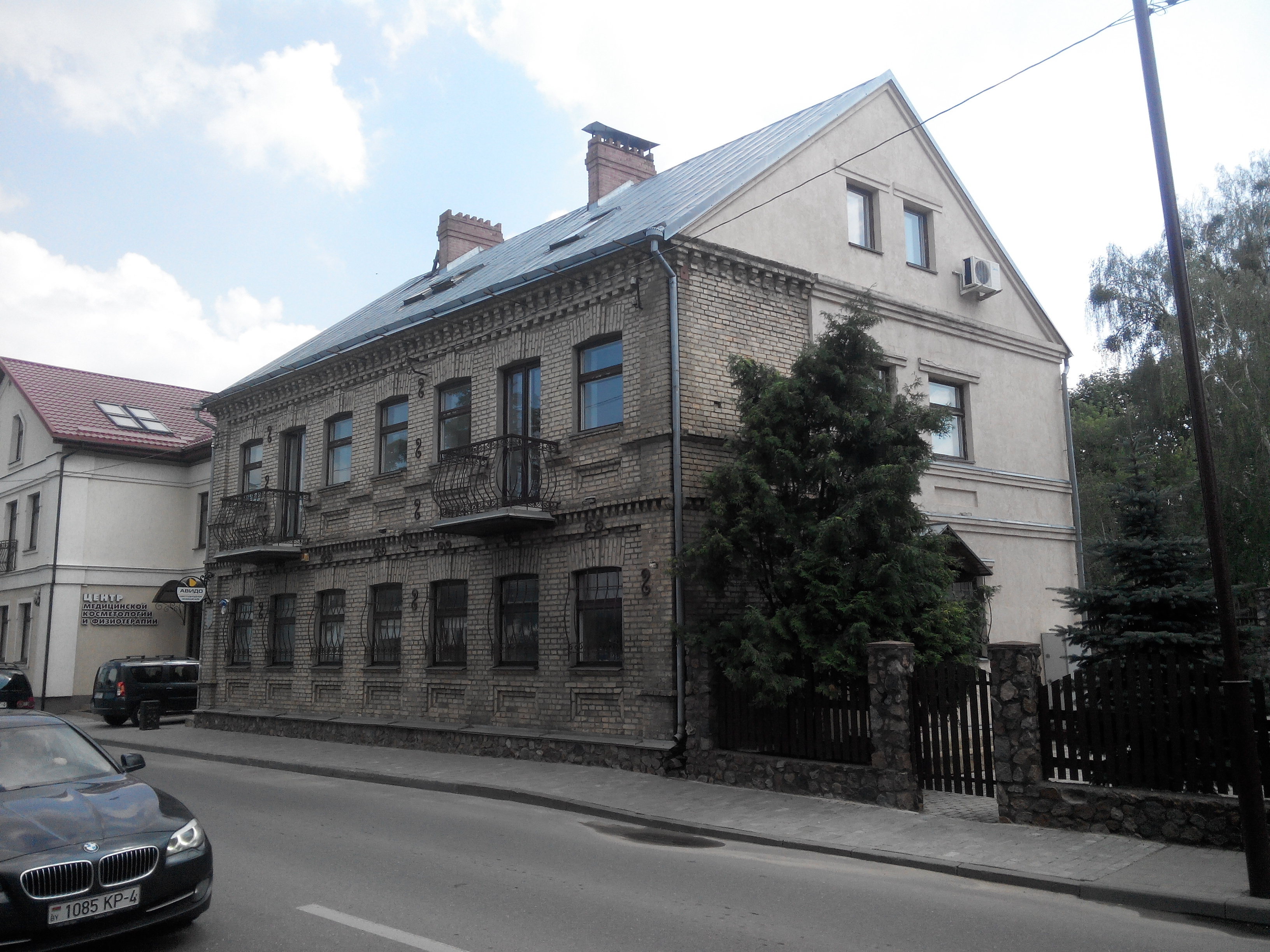 Будынак па вуліцы Вялікая Траецкая, 46, Гродна, Беларусь